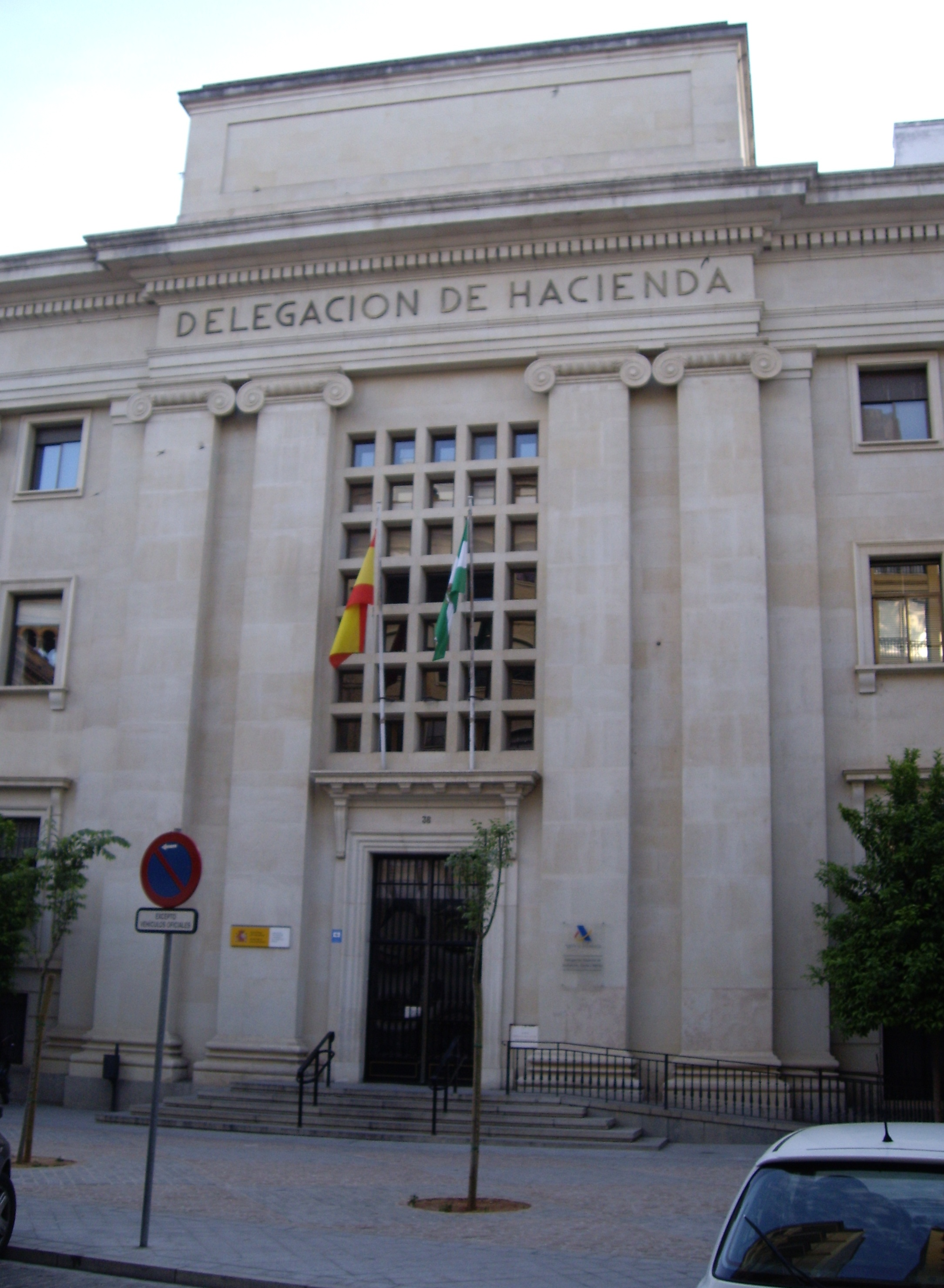 Edificio de la Delegación de Hacienda del España en Sevilla. Es un edificio de los años 40 construido en el lugar de la antigua aduana, donde se anotaban las mercancías traídas de América.